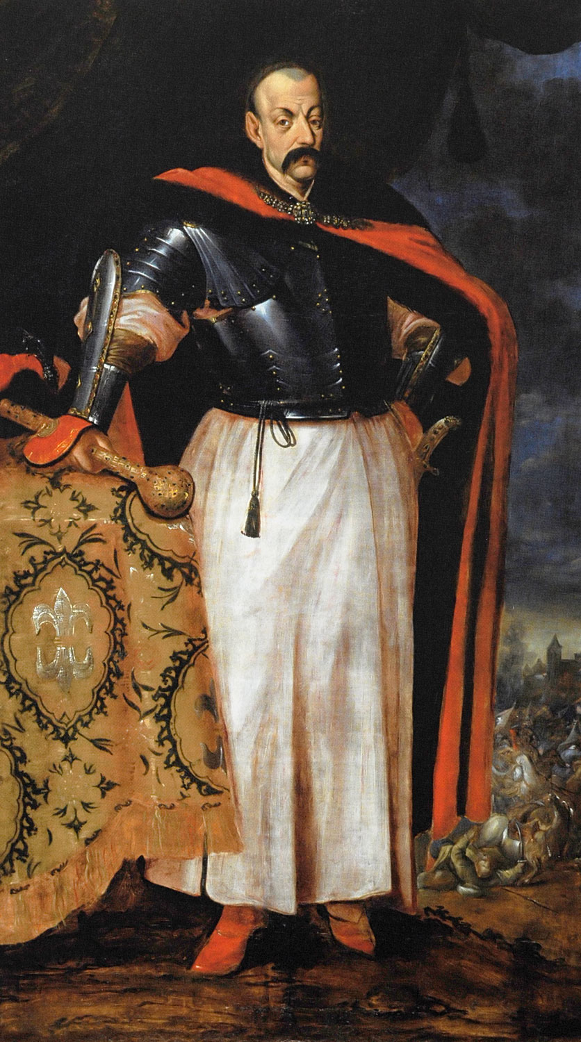 Беларуская (тарашкевіца): Партрэт Міхала Казімера Паца (Michał Kazimier Pac)